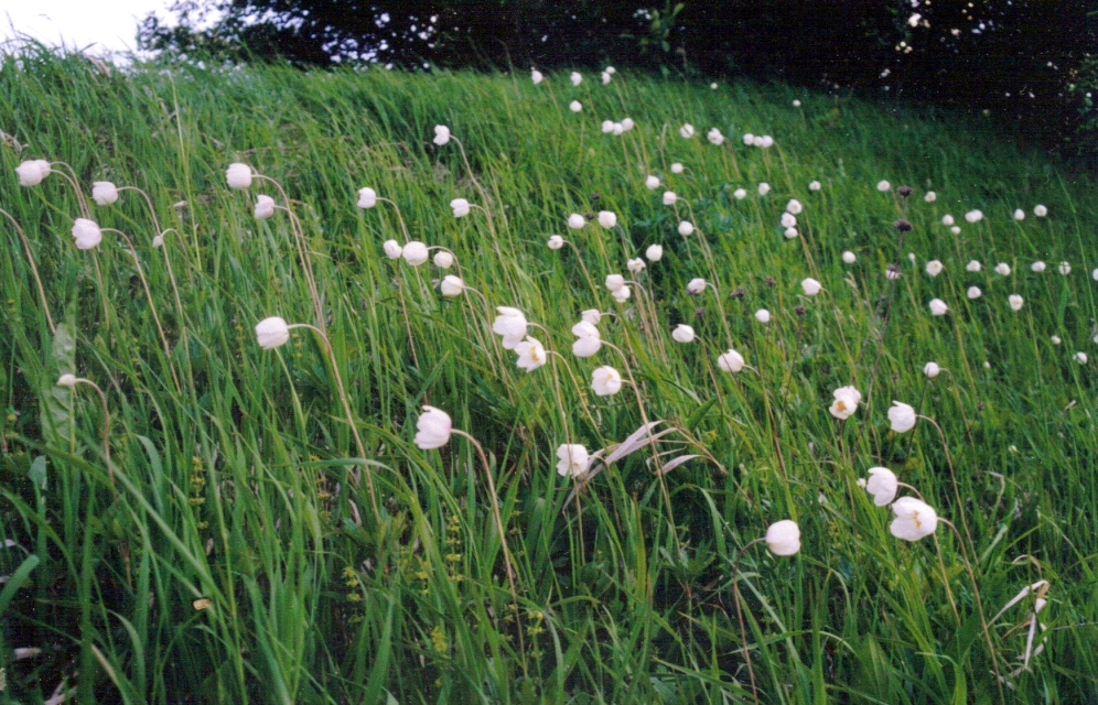 Murawa_kserotermiczna z Anemone sylvestris. Grojec k. Żywca. 2001.